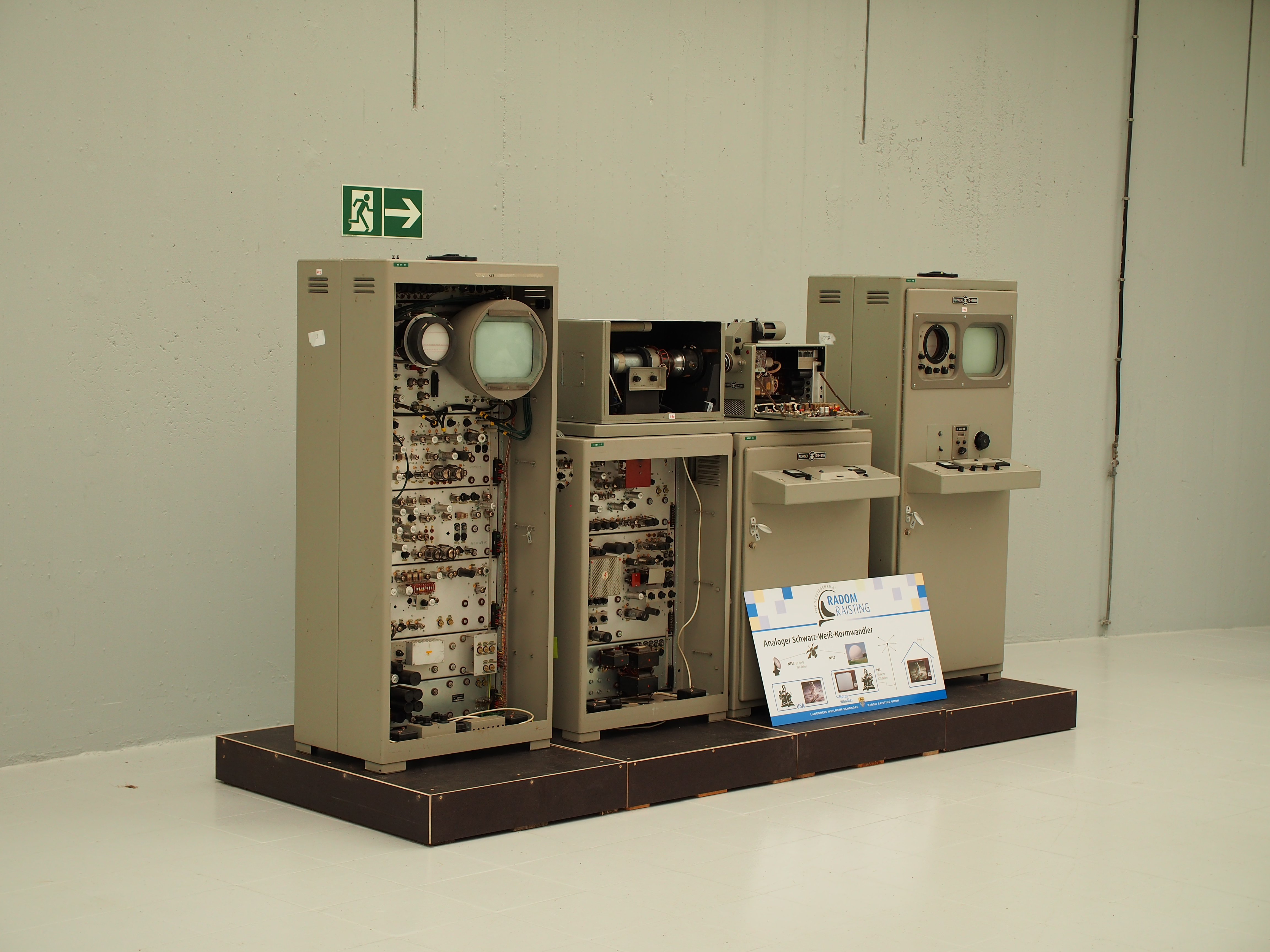 Normenwandler von NTSC (s/w) zur europäischen Gerbernorm. Das Bild wird auf einem in die Anlage integrierten Monitor wiedergegeben und abgefilmt. Hergestellt von der Fernseh GmbH.